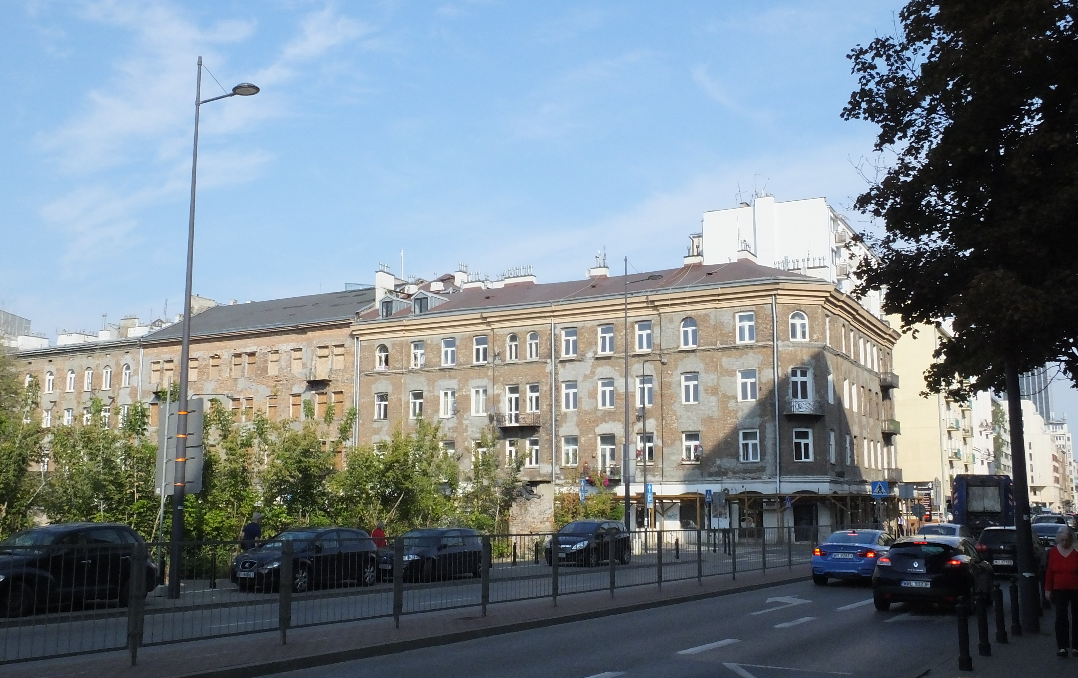 Kamienica Józefa Bakela w Warszawie, ulica Chmielna 126, róg Żelaznej i kamienica Gartsztajnów, ulica Chmielna 128